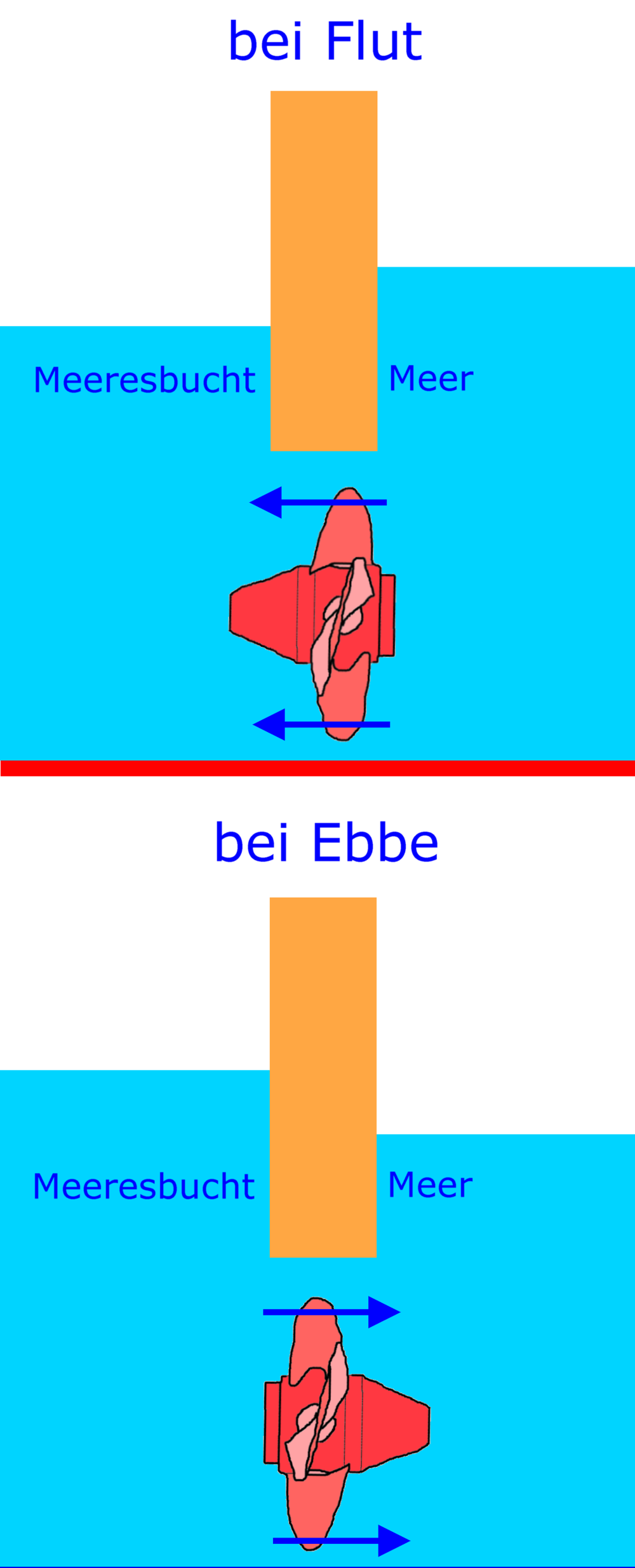 Bildbeschreibung: Funktion eines Gezeitenkraftwerkes Fotograf/Zeichner: DER UNFASSBARE Datum: 04.03.2006